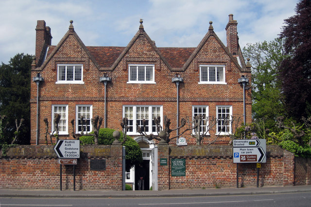 Quebec House, Quebec Square, Westerham, Kent